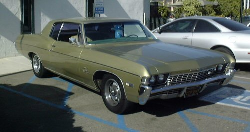 1968 Chevrolet Impala.